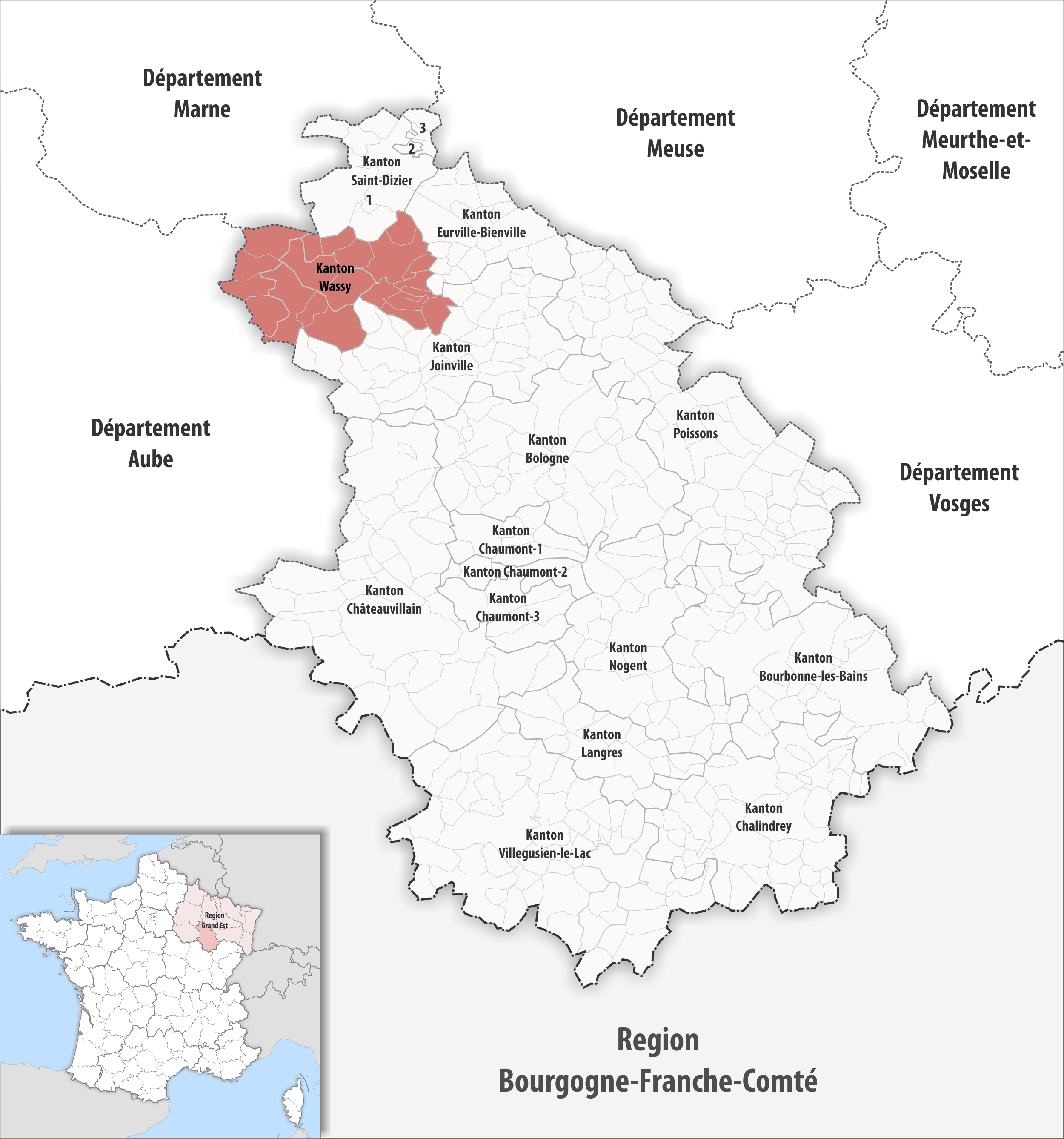 Lage des Kantons Wassy